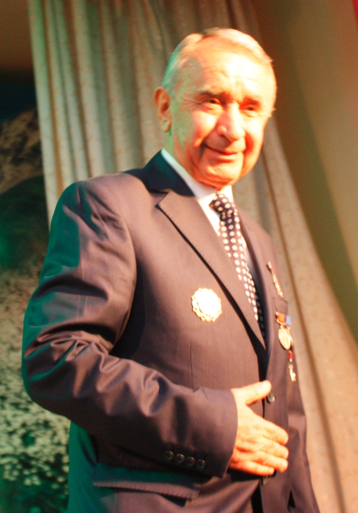 А. Холикназаров, ТНУ, Заслуженный работник культуры Таджикистана